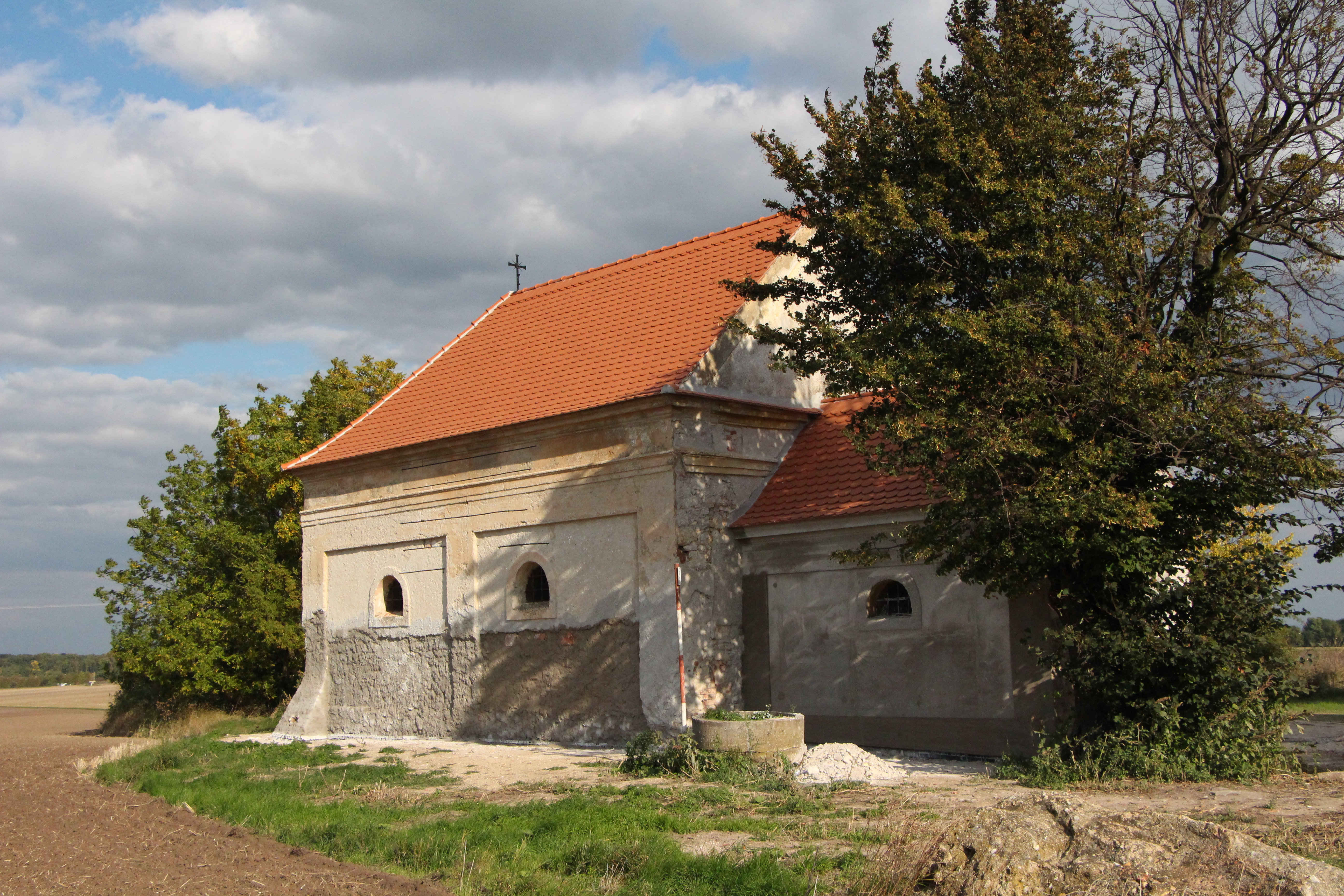 Kaple svatého Cyrila a Metoděje.